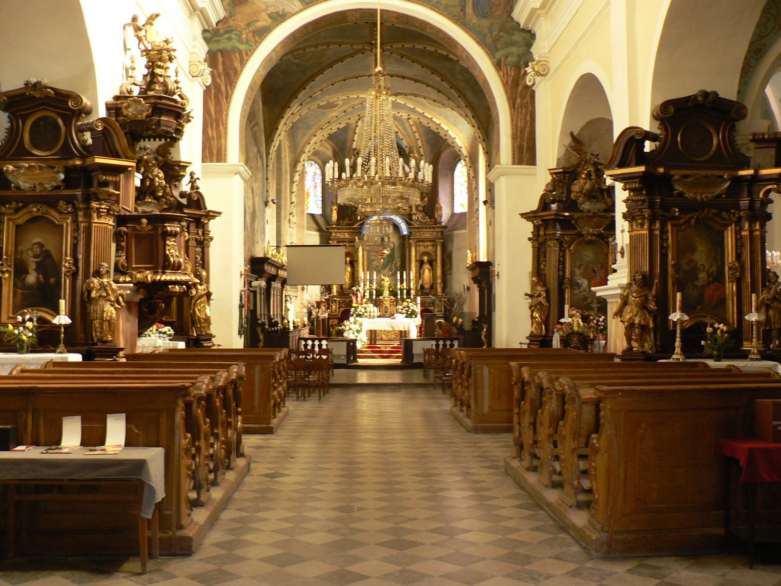 Kościół farny pw. Wniebowzięcia NMP